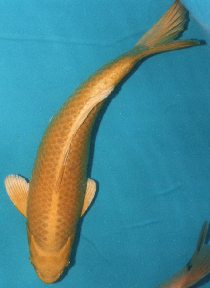 Yamabuki Ogon